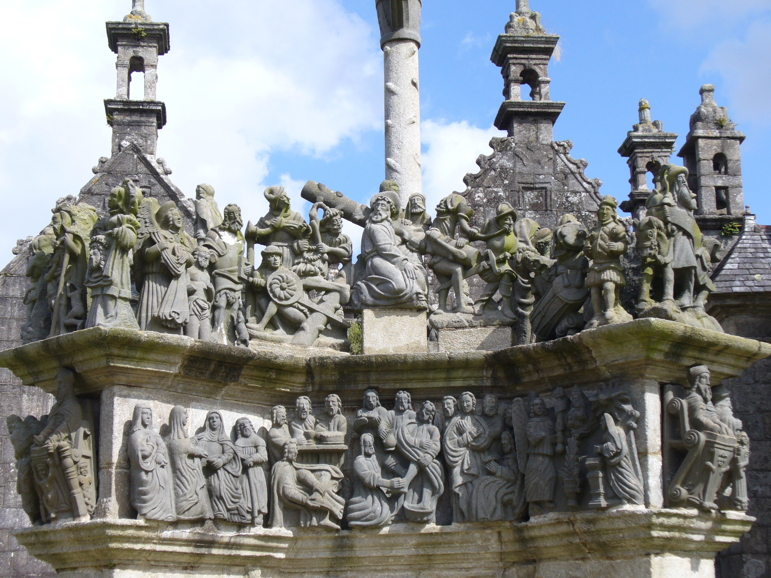 Calvaire-Kalvarienberg von Saint Miliau in Guimiliau zwischen 1581 und 1588 errichtet zeigt mit insgesamt 200 Figuren 17 Passionsszenen im Turm und im Fries 15 Szenen aus dem Leben Jesu